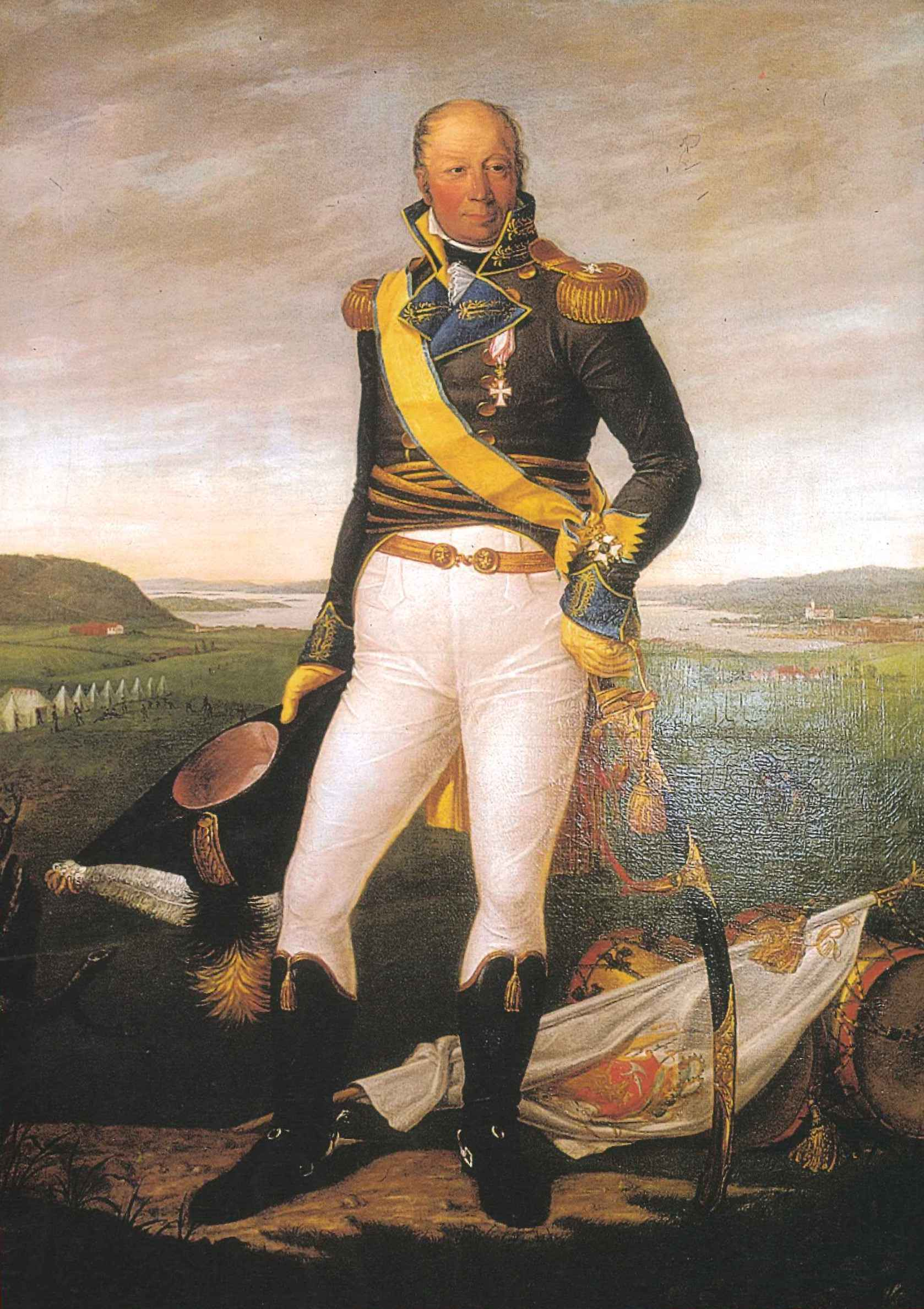 Diderich Hegermann (1763-1835), generalmajor. Maleri i den gamle Krigsskole, Tollbugt. 10 i Oslo